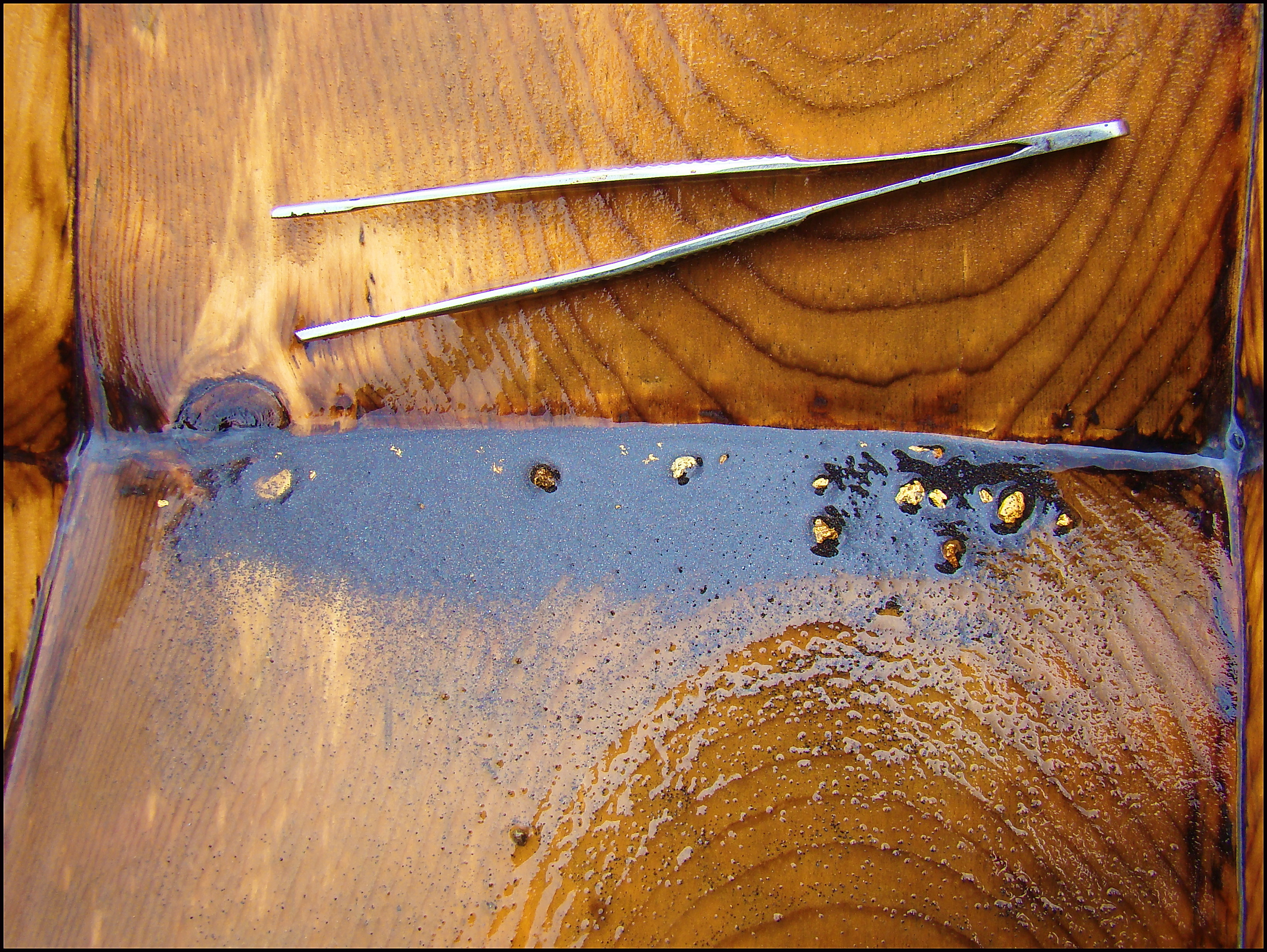 Пример слабоокатанного золота из россыпи в шлиховом лотке. Темный мелкий песок — магнетит. Алтай.